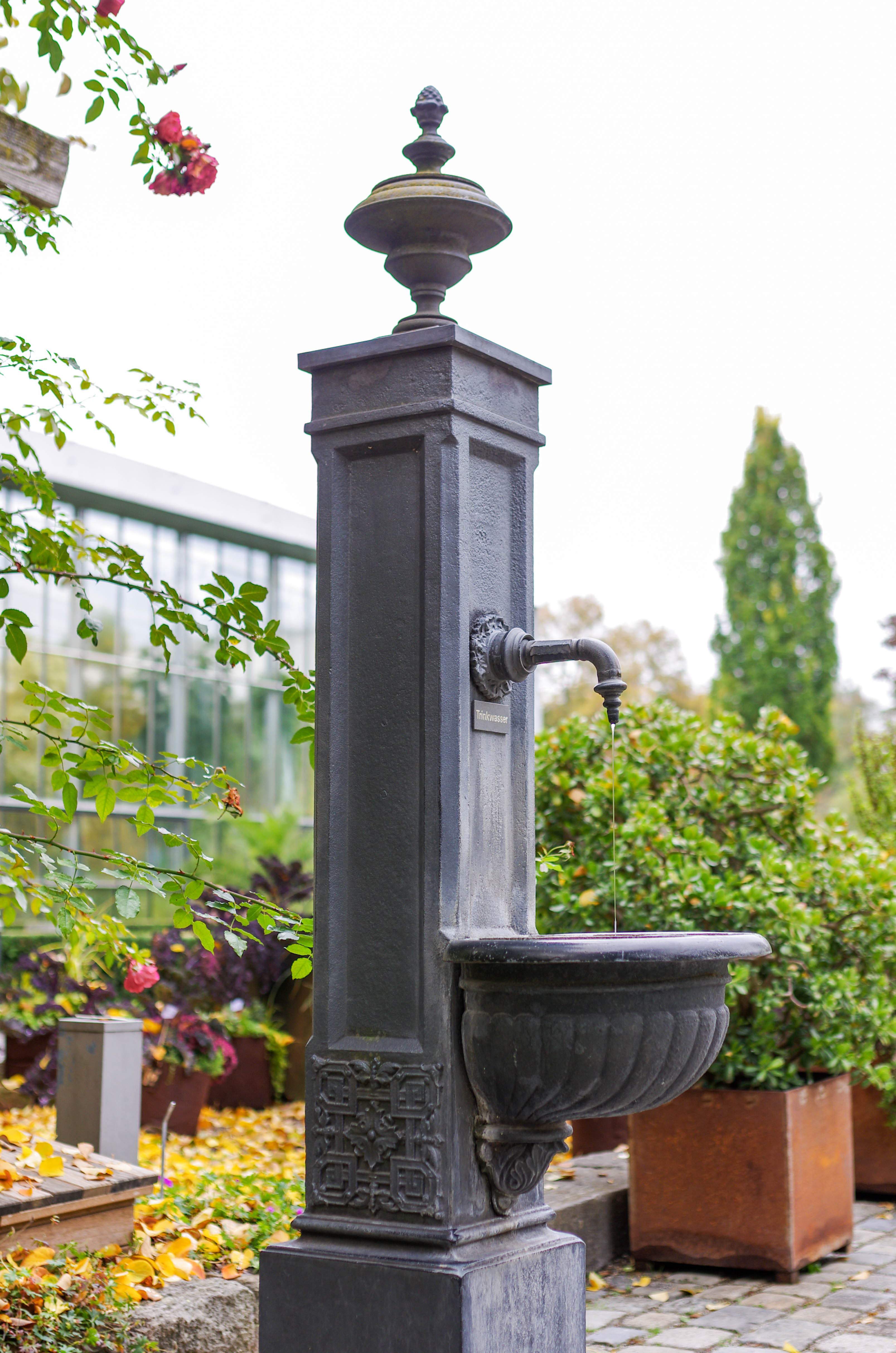 Gesamtansicht des gusseisernen Brunnens von NWThis is a photograph of an architectural monument.